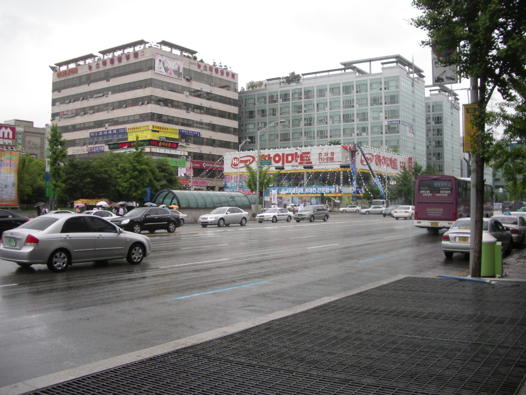 오리역 주변